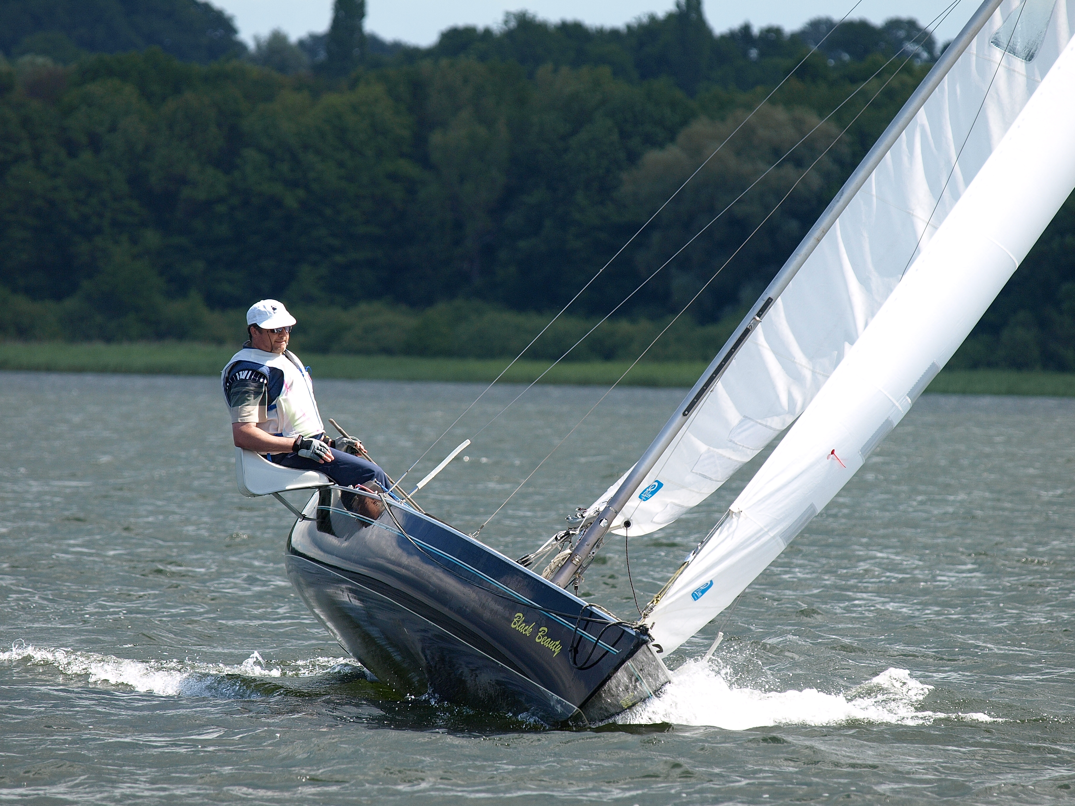 MONAS Ausreitsitz